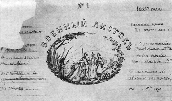 Эскиз обложки несостоявшегося издания Льва Толстого "Военный листок"